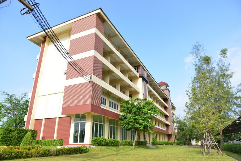 อาคารศรีสายปัญญา